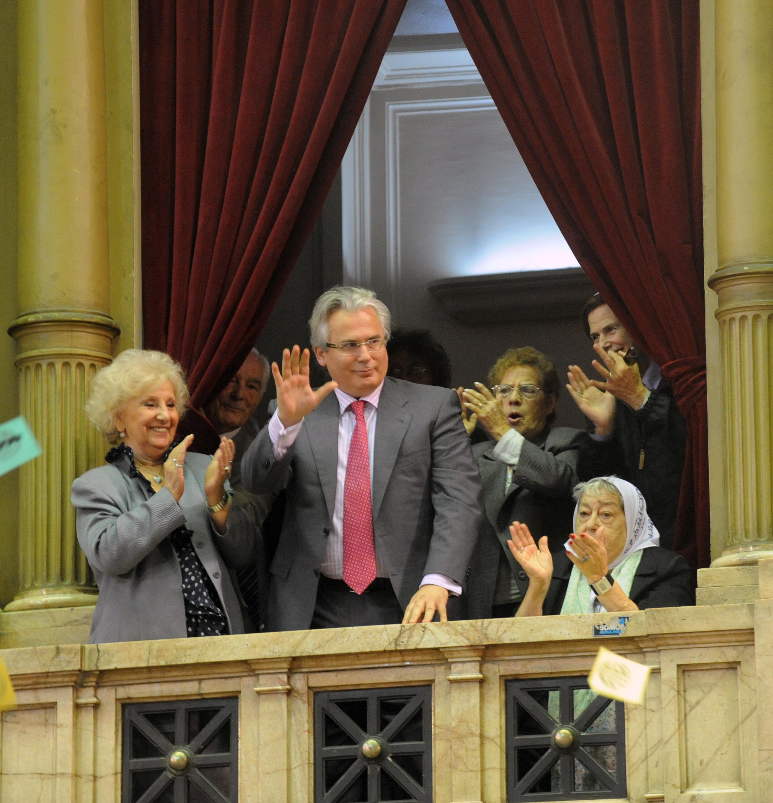 La presidenta Cristina Fernández inauguró hoy el 130ª período de sesiones ordinarias del Congreso, en el Palacio sede del Poder Legislativo Nacional. Ante la Asamblea Legislativa, la jefa de Estado informó sobre los logros de su gestión. Anunció que buscará reformular los convenios para que sean tres los vuelos semanales a las Malvinas y que sean cubiertos por Aerolíneas Argentinas. Dijo que tomará medidas para asegurar el abastecimiento de combustible de los argentinos. Anticipó el envío al Parlamento de los nuevos códigos civil y comercial y de una nueva carta orgánica del Banco Central. Reiteró que no le “temblará el pulso” para tomar decisiones en materia de ferrocarriles. Informó que se prorrogará otros 30 días la custodia de la Policía Federal en la red de subterráneos. Además, homenajeó al ex juez español Baltasar Garzón, presente en el acto.